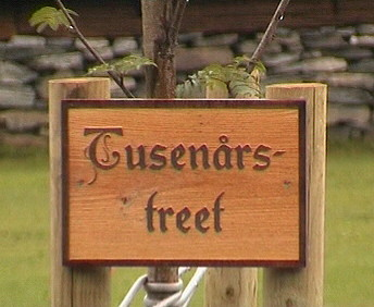 Tusendårstreet bei der Stabkirche in Lom